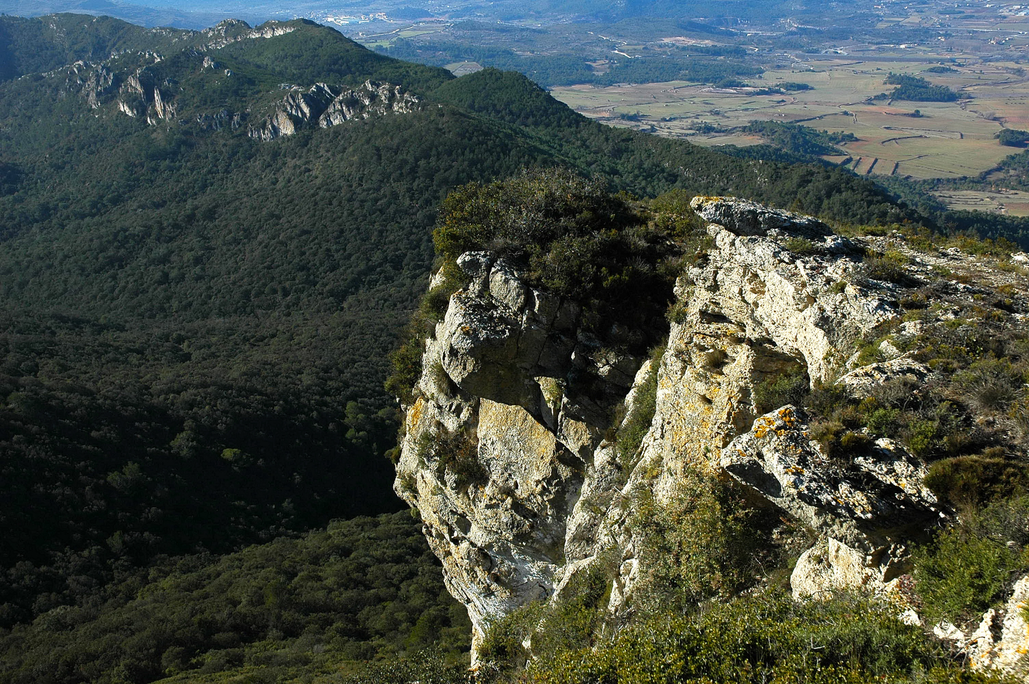 Serra de Miramar view Vista de la Serra de Miramar